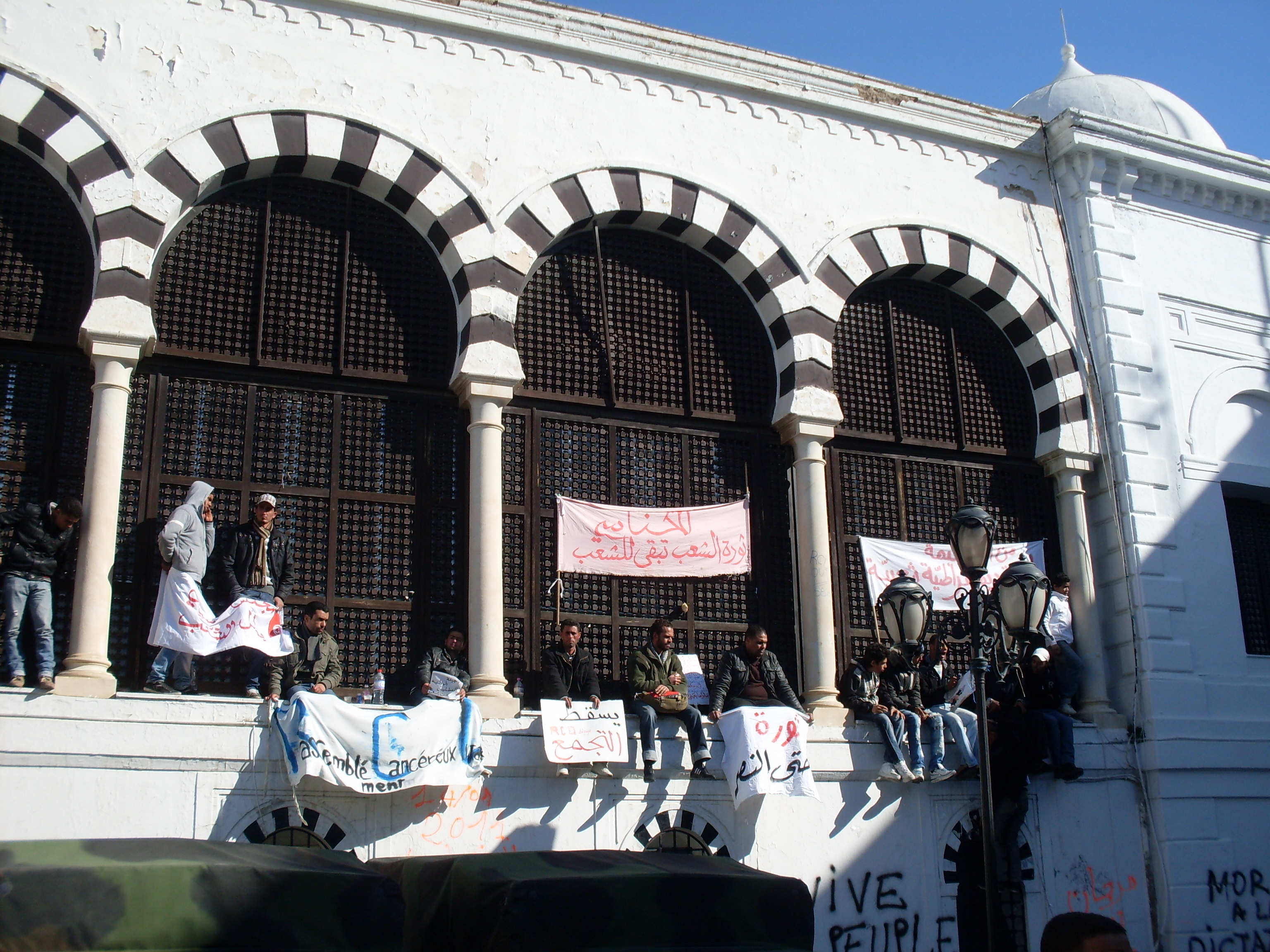 Manifestations à la place du gouvernement lors de la Caravane de la libération suite à la révolution des Jasmins